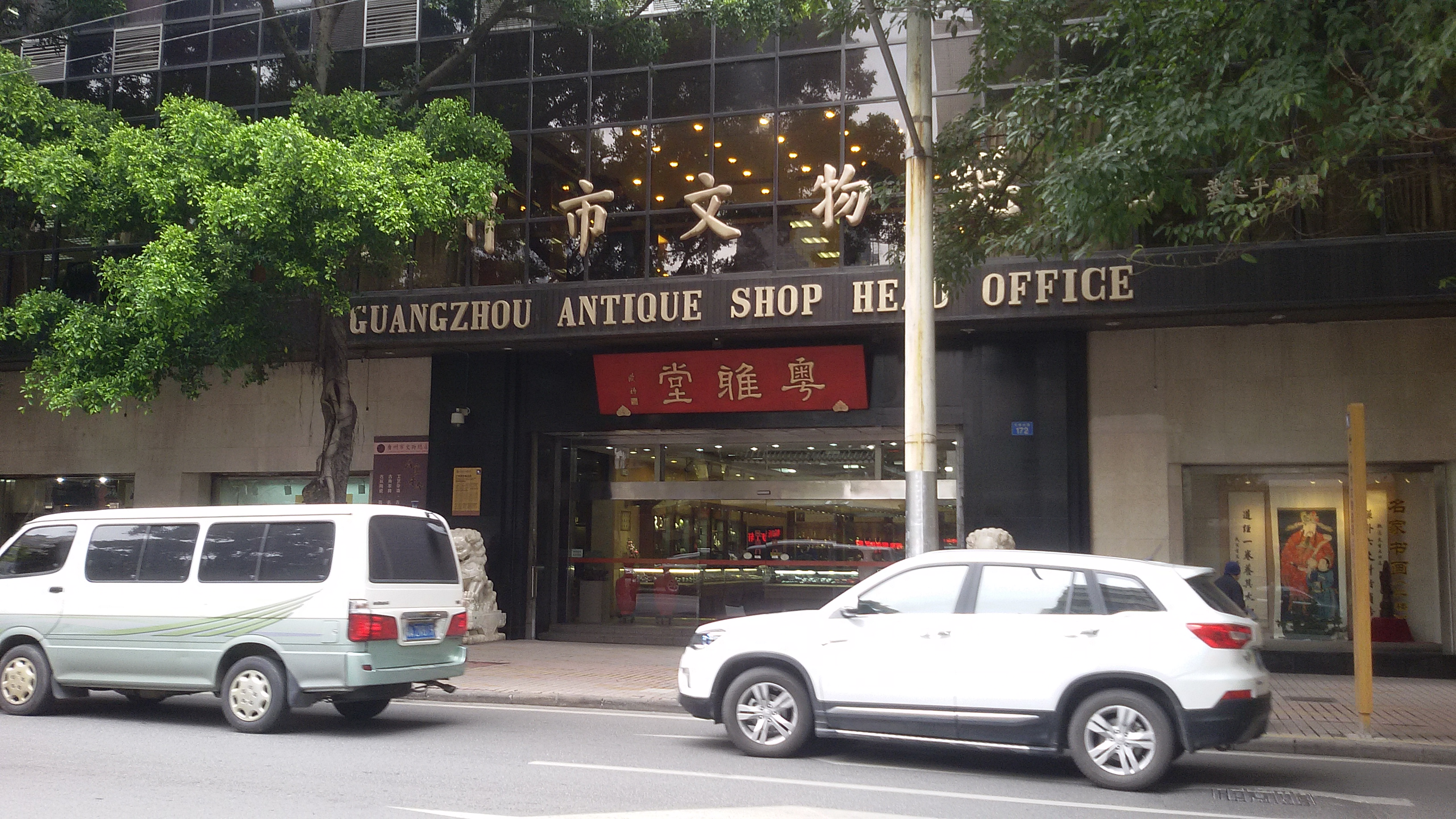 粵語: 廣州市文物總店